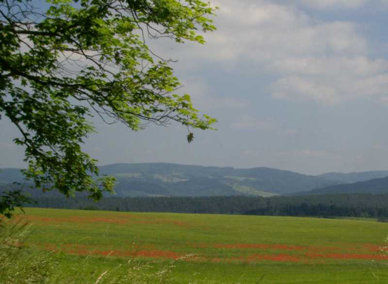 Der Kalte Staudenkopf (768 m) im Thüringer Wald von Richtung Hildburghausen (Süden) aus; auf halber Höhe der Ort Steinbach, links davon der unbewaldete Ziegenrücken (661 m), weiter links der Salzleckenkopf (640 m). Halbrechts der Buchenkopf (ca. 710 m), rechts davon - hinter dem Tal der Schleuse - der Schwefelkopf (774 m) und sein linker Nebengipfel Sommerberg (756 m) . Rechts des Bildausschnittes schließt sich der Simmersberg (781 m) an.